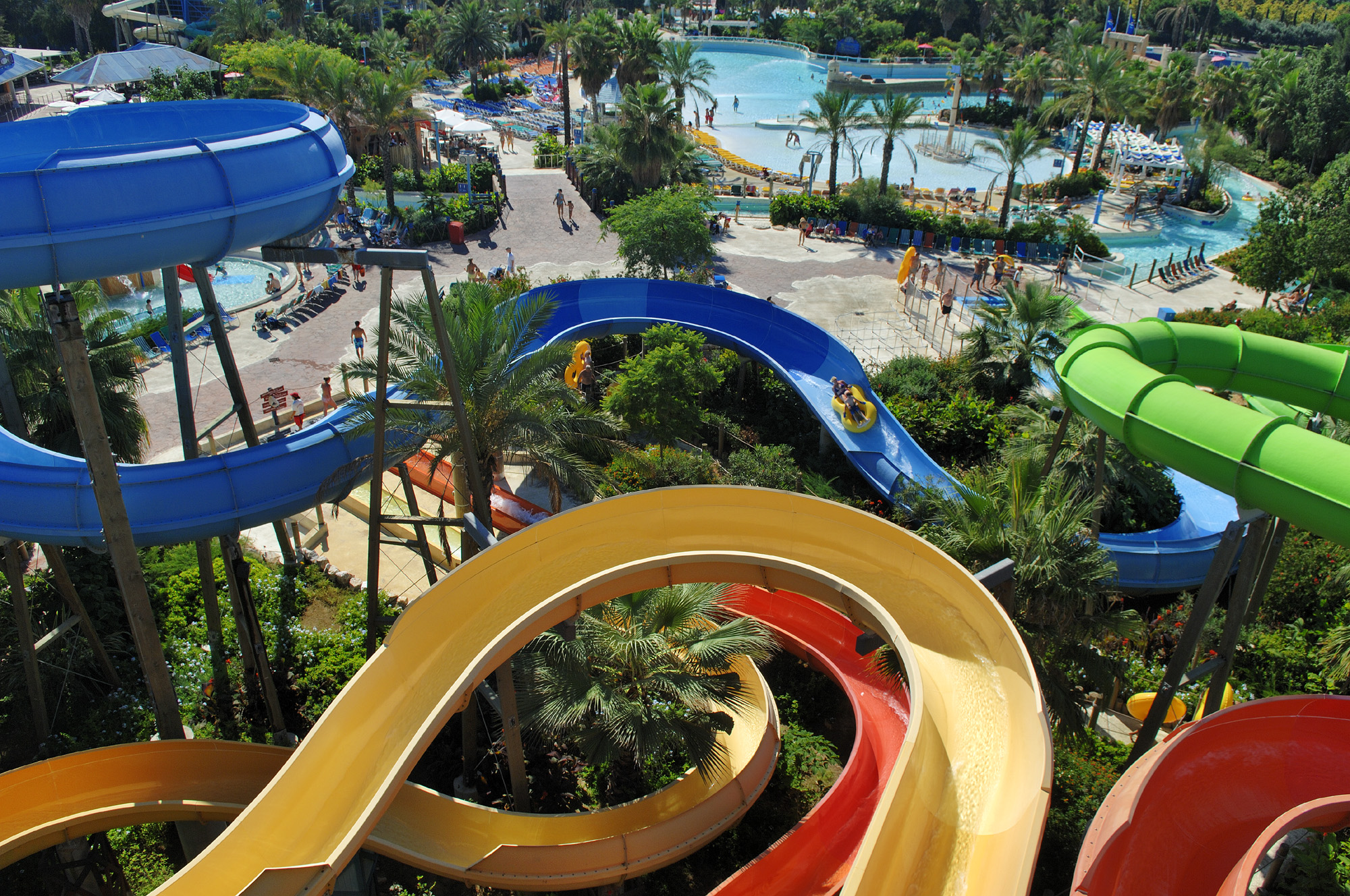 Photo de Caribe Aquatic Park